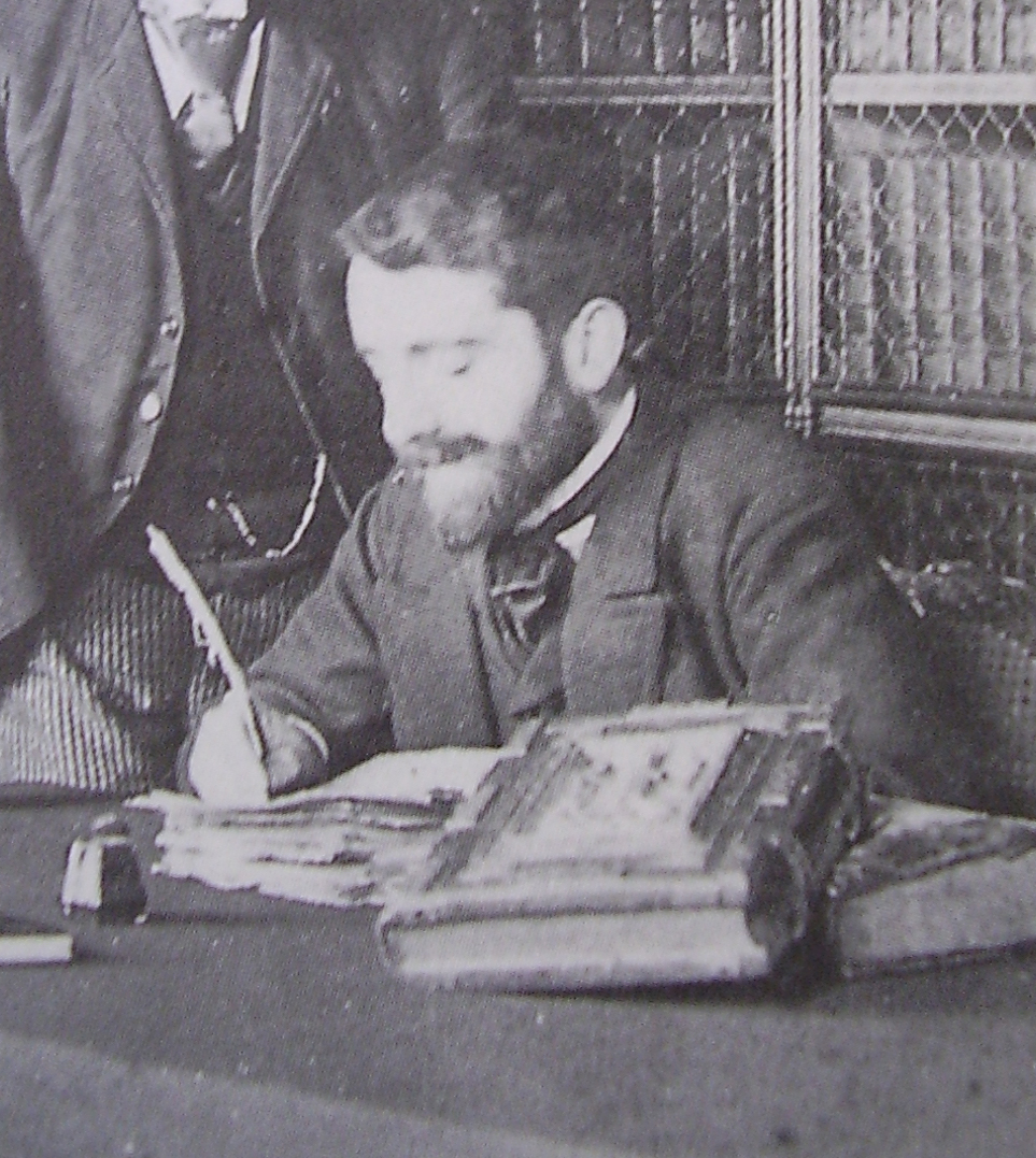 Photo de Frantz Funck-Brentano